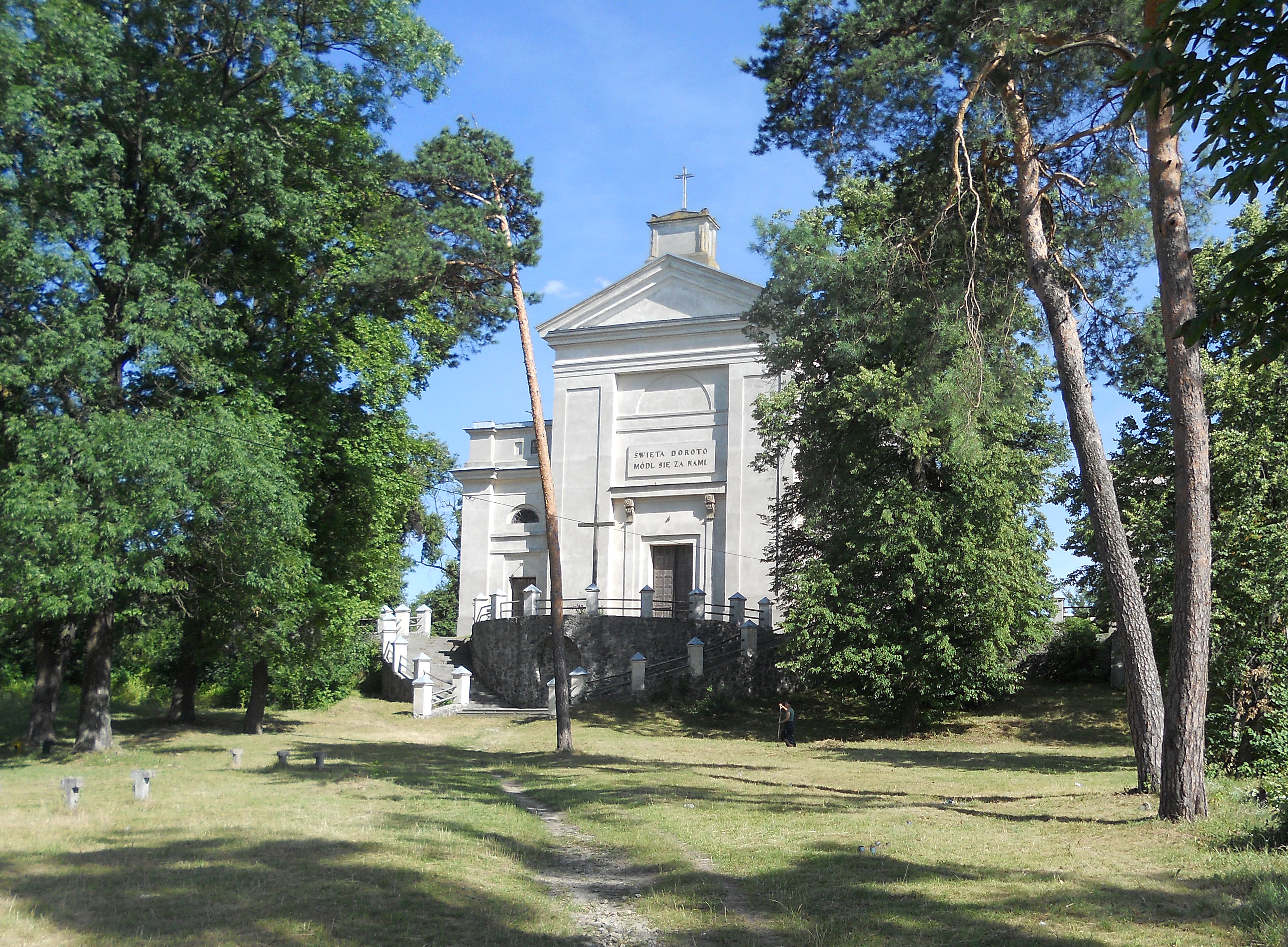 Костел святої Дороти від чолового фасаду. Славута на Волині.